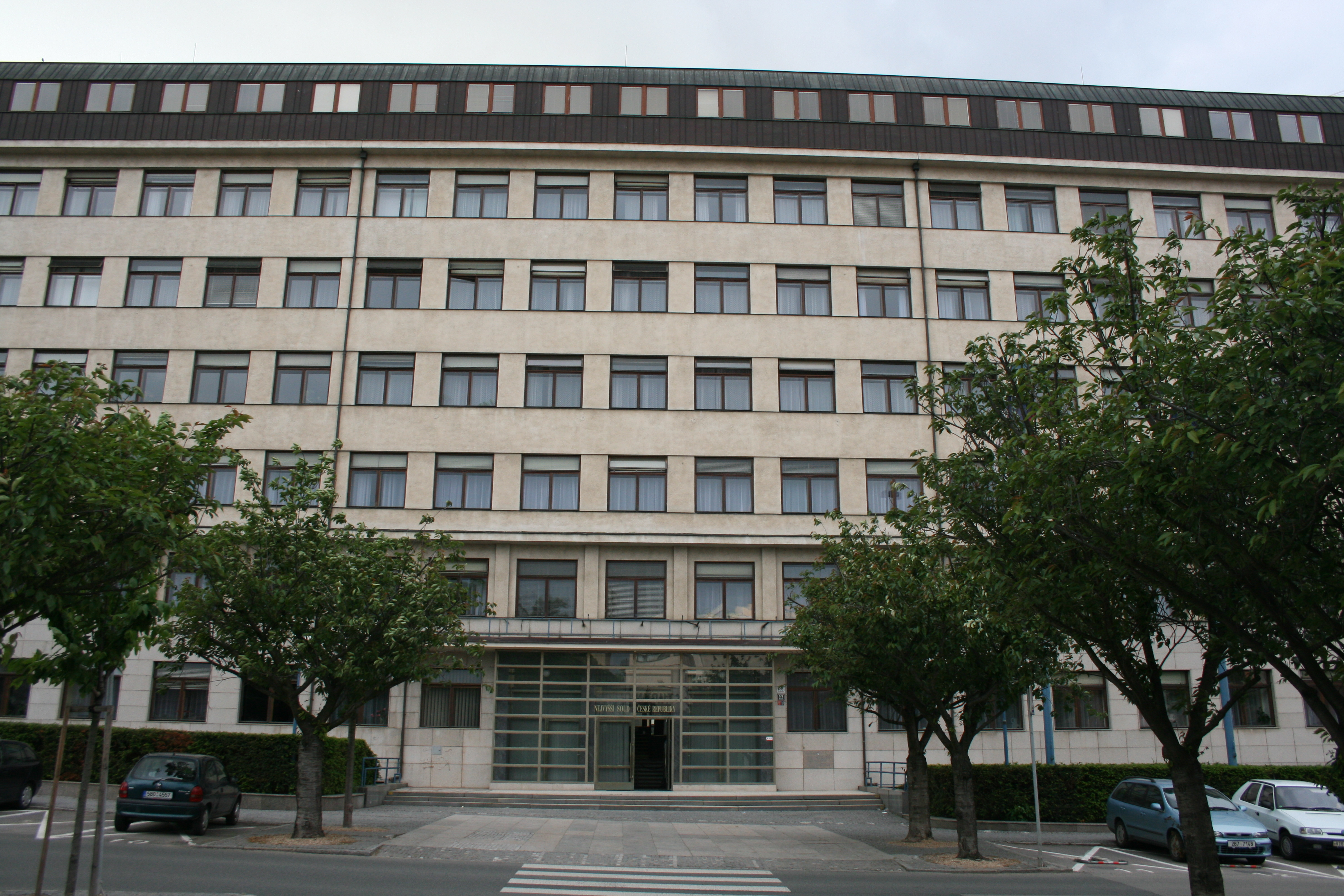 Budova Nejvyššího soudu České republiky v Brně, Burešova 20. Původně budova Všeobecného penzijního ústavu, postavená dle projektu architekta Emila Králíka z roku 1932.